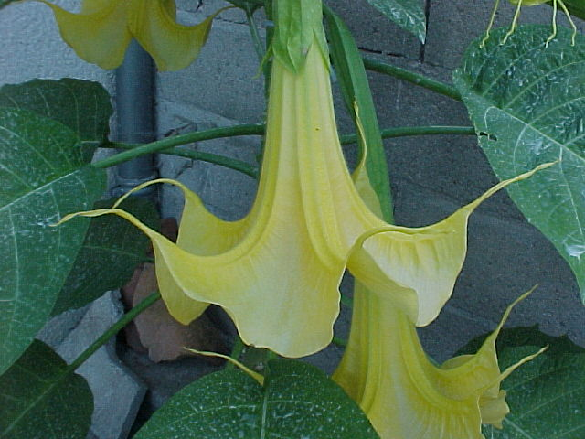 brugmansia Charles Grimaldi 2